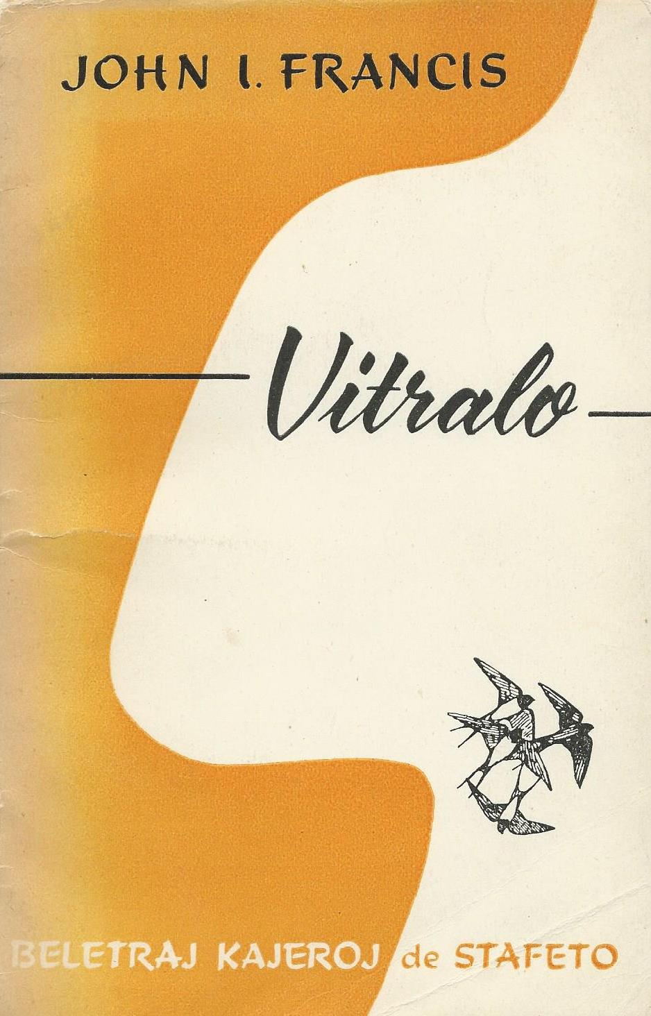 librokovrilo de "Vitralo", 1960